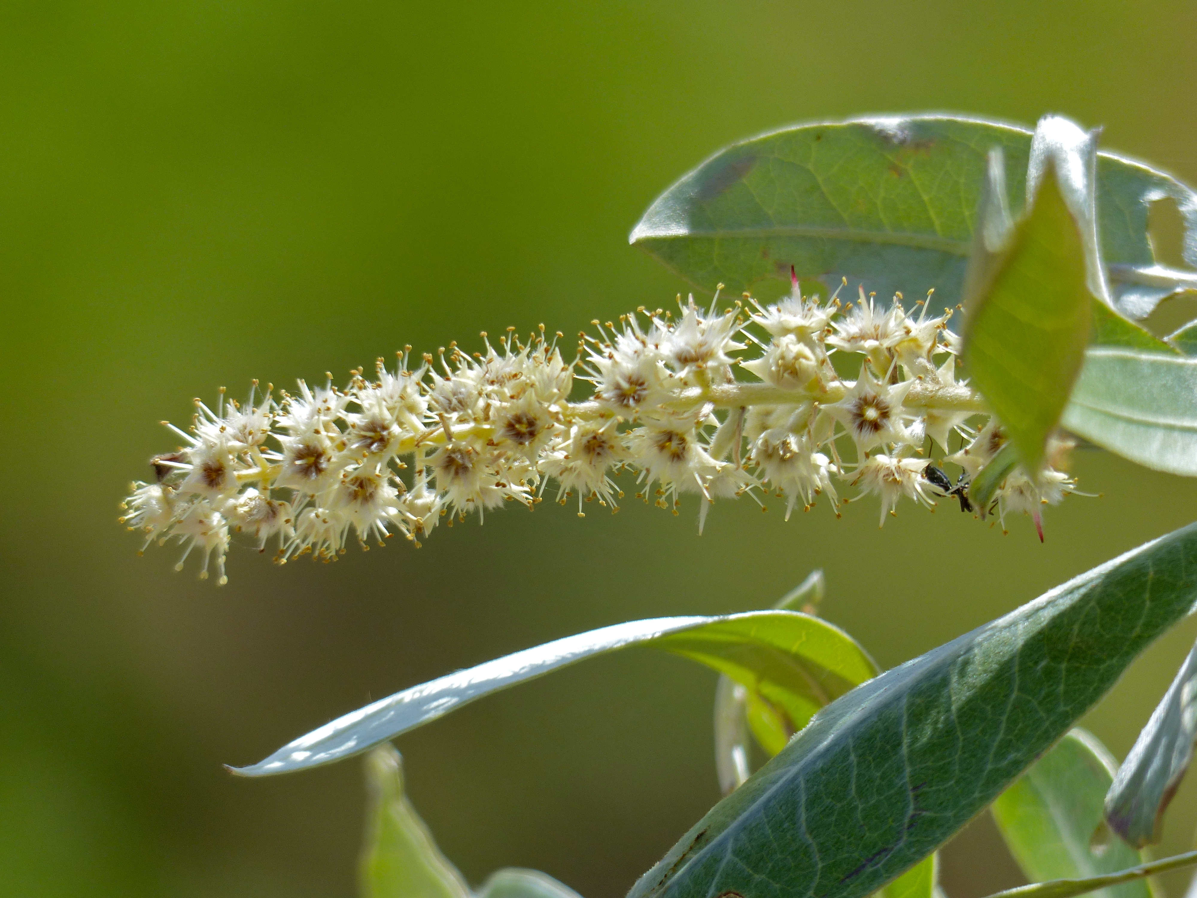 Mahonie Loop near Punda Maria, Kruger NP, SOUTH AFRICA